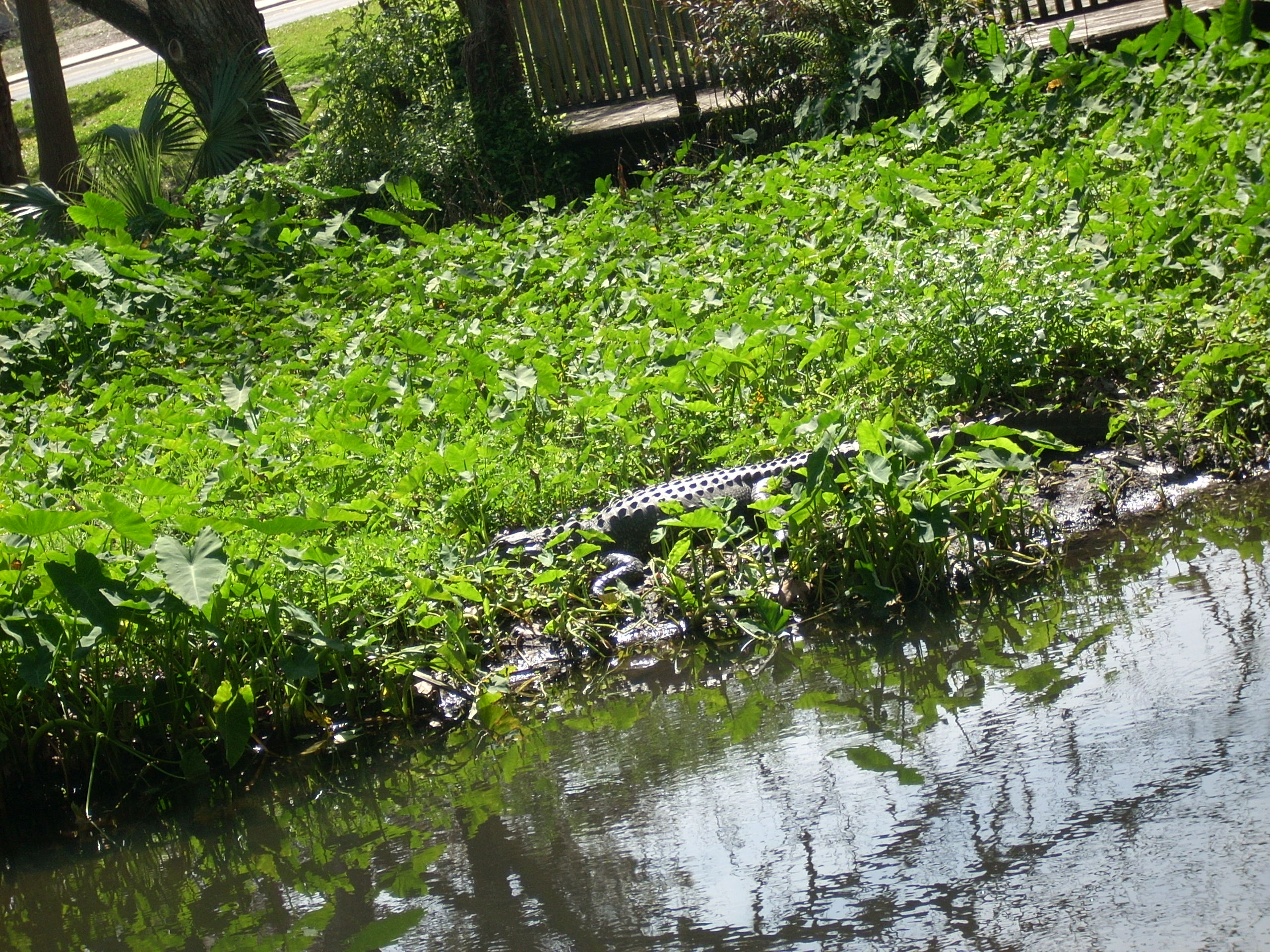 אליגאטור בקמפוס אוניברסיטת פלורידה, 2008